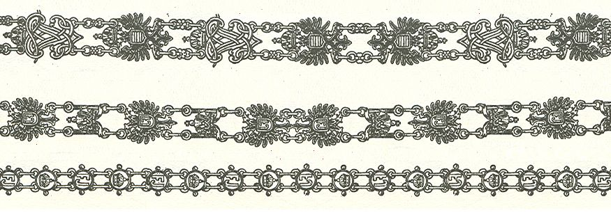 Scan van Blz. 285 van het boek "Handbuch der Ritter- und Verdienstorden " uitgegeven 1893 door Weber.Tekening van de in 1902 overleden Maximilian Gritzner. Robert Prummel 10 jul 2008 16:40 (CEST)